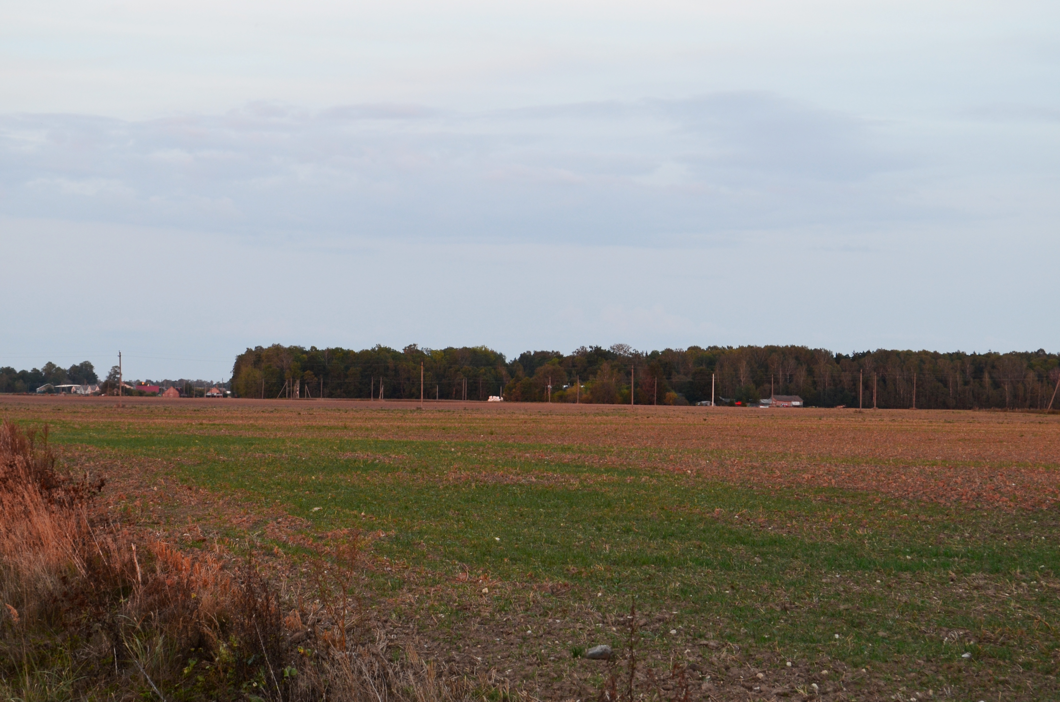 Tremtiniai, Kėdainių raj.